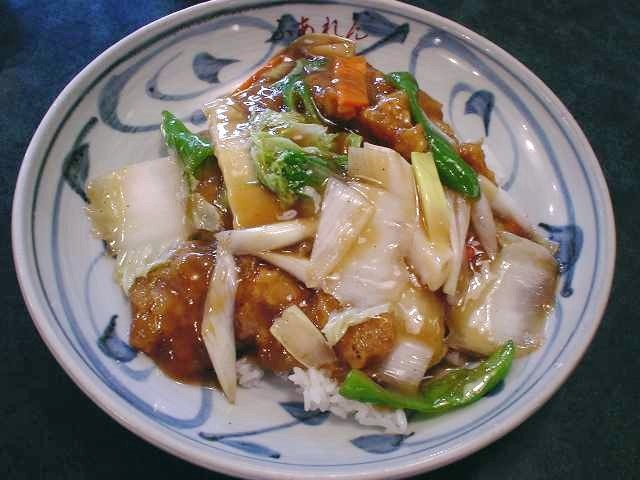 中華丼（2005年6月投稿者が撮影） Category:どんぶり画像